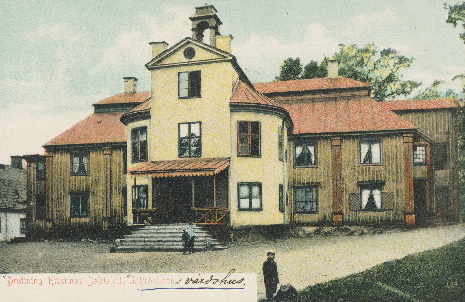 Liljeholmens värdshus, även kallat "Drottning Kristinas Jaktslott på Liljeholmen"